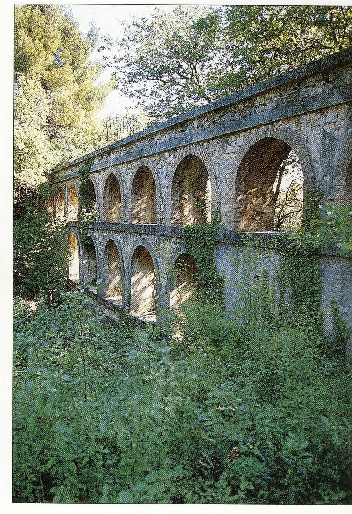 Laudun-l'Ardoise (Gard - France) - L'aqueduc de Balouvière